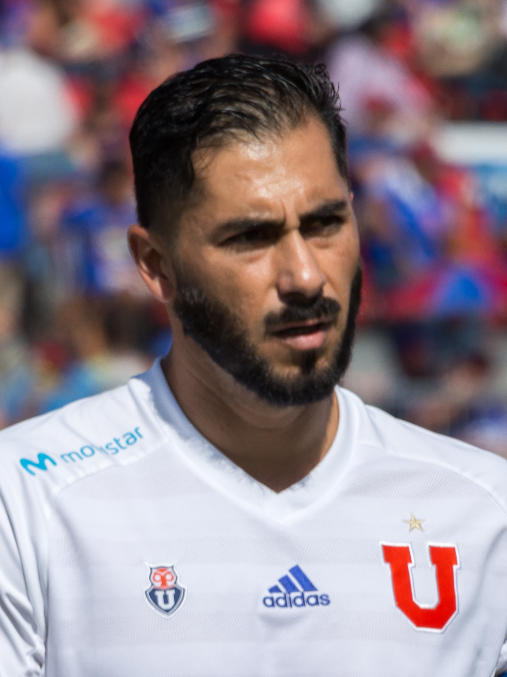 Johnny Herrera, Universidad de Chile v Unión Española, Estadio Nacional Julio Martínez Prádanos, Ñuñoa, Santiago, Región Metropolitana, Chile.